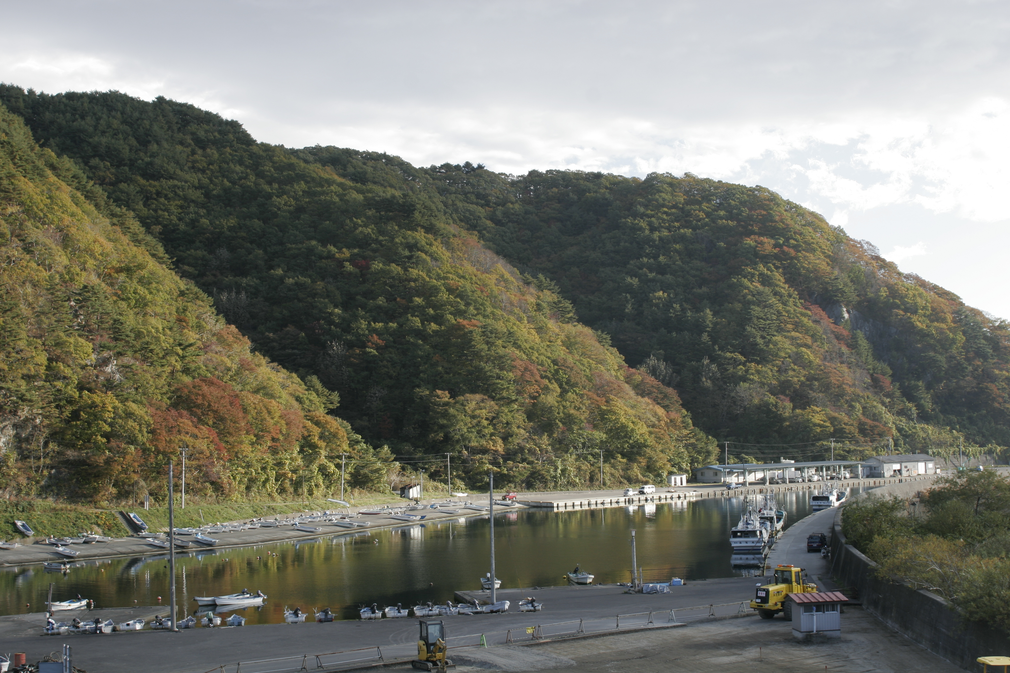 小本魚港